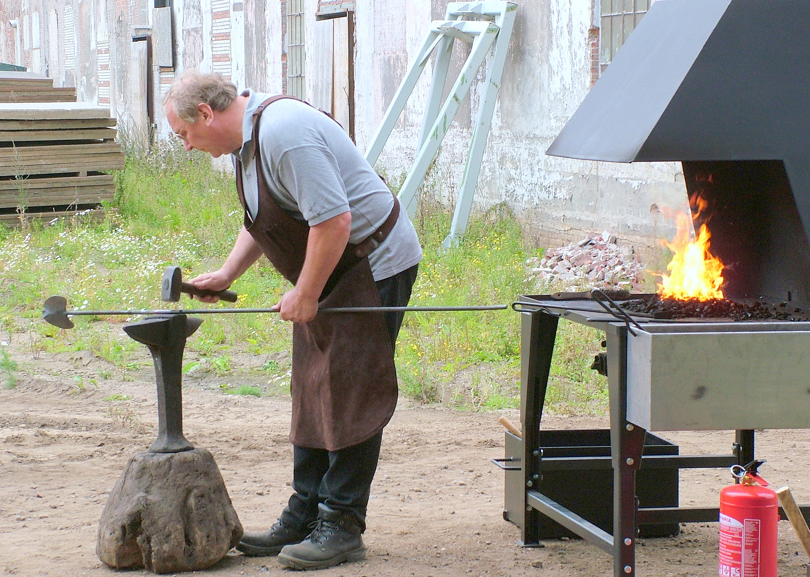 Smid bij de opening van de ijzertentoonstelling, Ulft.